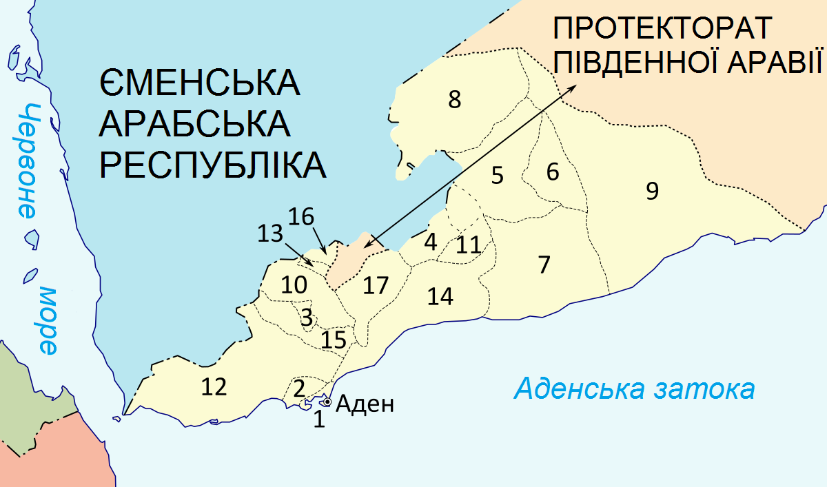 Карта суб'єктів Федерації Південної Аравії (українською мовою) 1. Аден (британська колонія) 2. Акрабі (шейхство) 3. Алаві (шейхство) 4. Аудхалі (султанат) 5. Аулакі, Верхній (султанат) 6. Аулакі, Верхній (шейхство) 7. Аулакі, Нижній (султанат) 8. Бейхан (емірат) 9. Вахіді (султанат) 10. Далі (емірат) 11. Датина (шейхство) 12. Лахедж (султанат) 13. Мафлахі (шейхство) 14. Фадля (султанат) 15. Хаушебі (султанат) 16. Шаїб (шейхство) 17. Яфа, Нижня (султанат)